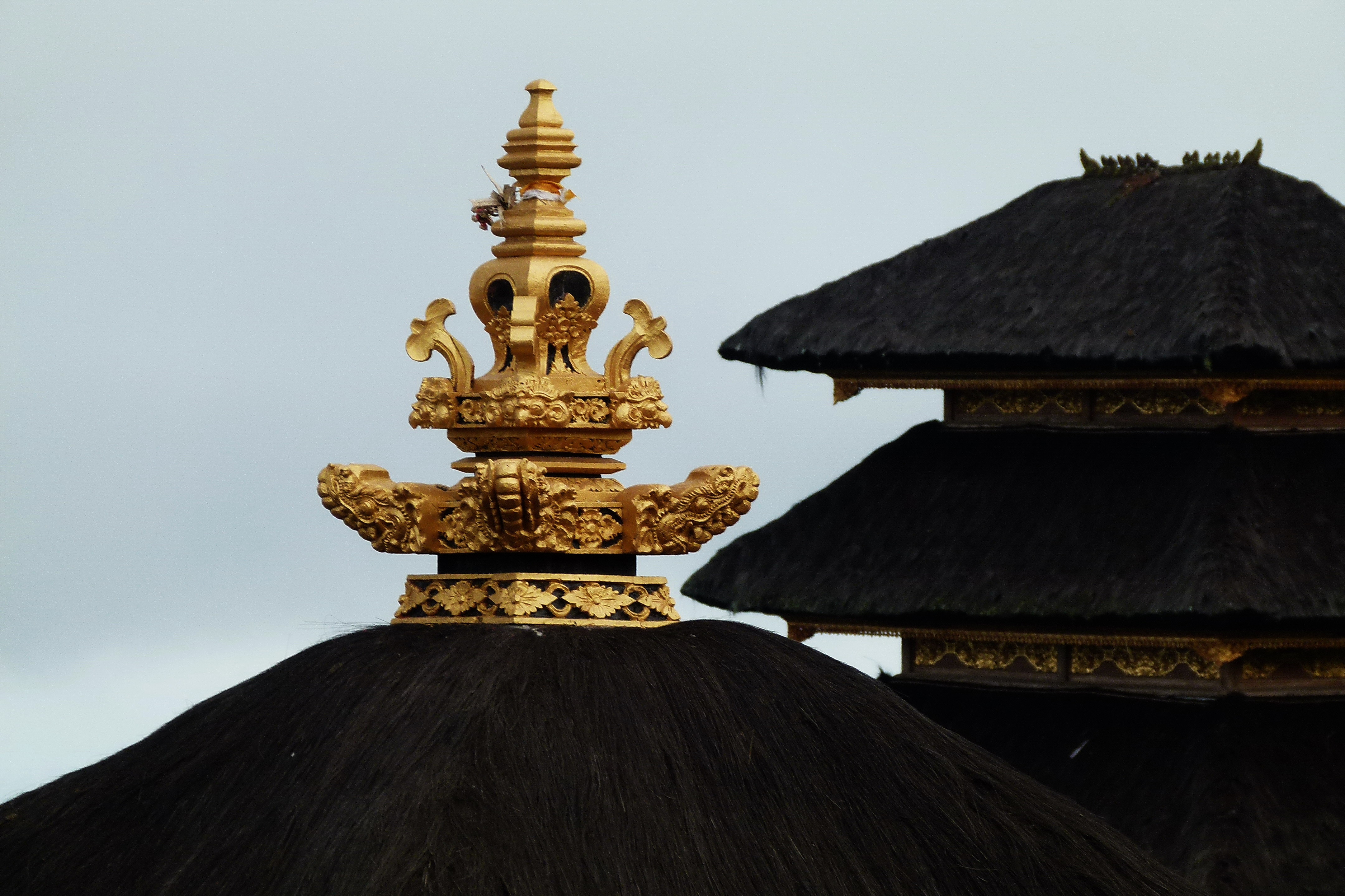 Muttertempel Pura Besakih auf Bali